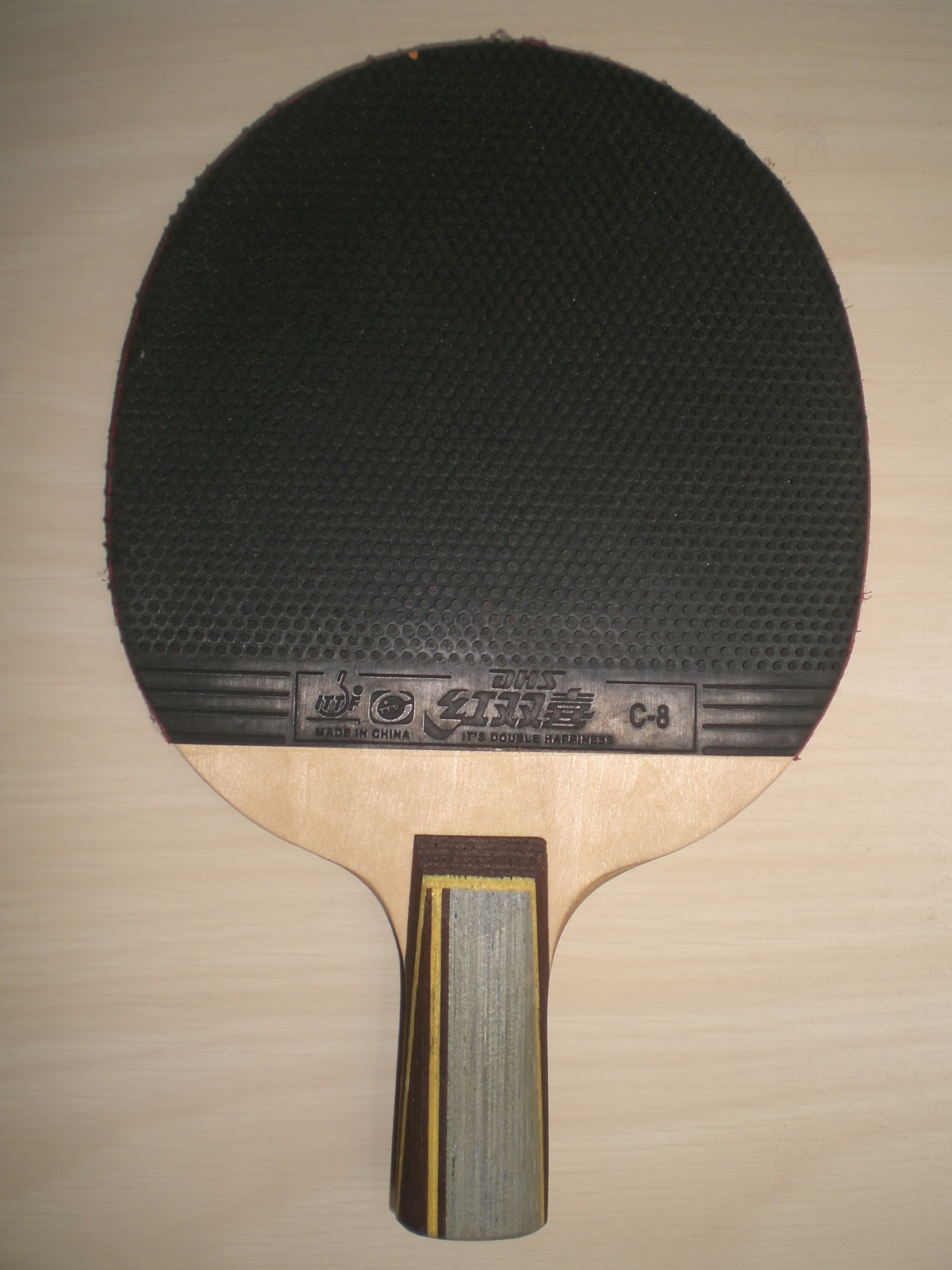 紅雙喜牌子桌球拍, 中國製造中國馳名商標